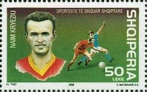 Naim Kryeziu